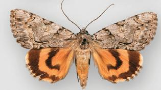 Catocala beutenmuelleri